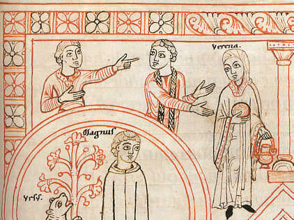 Verena mit Kanne und Teller (rechts) wird vom Knecht (links) beim Priester (Mitte) des Weindiebstahls bezichtigt; in: Chorbuch für die Prim, Ausschnitt aus einer Bilderseite zum Monat September. Kloster Zwiefalten, zwischen 1138 und 1147; Stuttgart, Württembergische Landesbibliothek, Cod. hist. 2° 415, fol. 62v